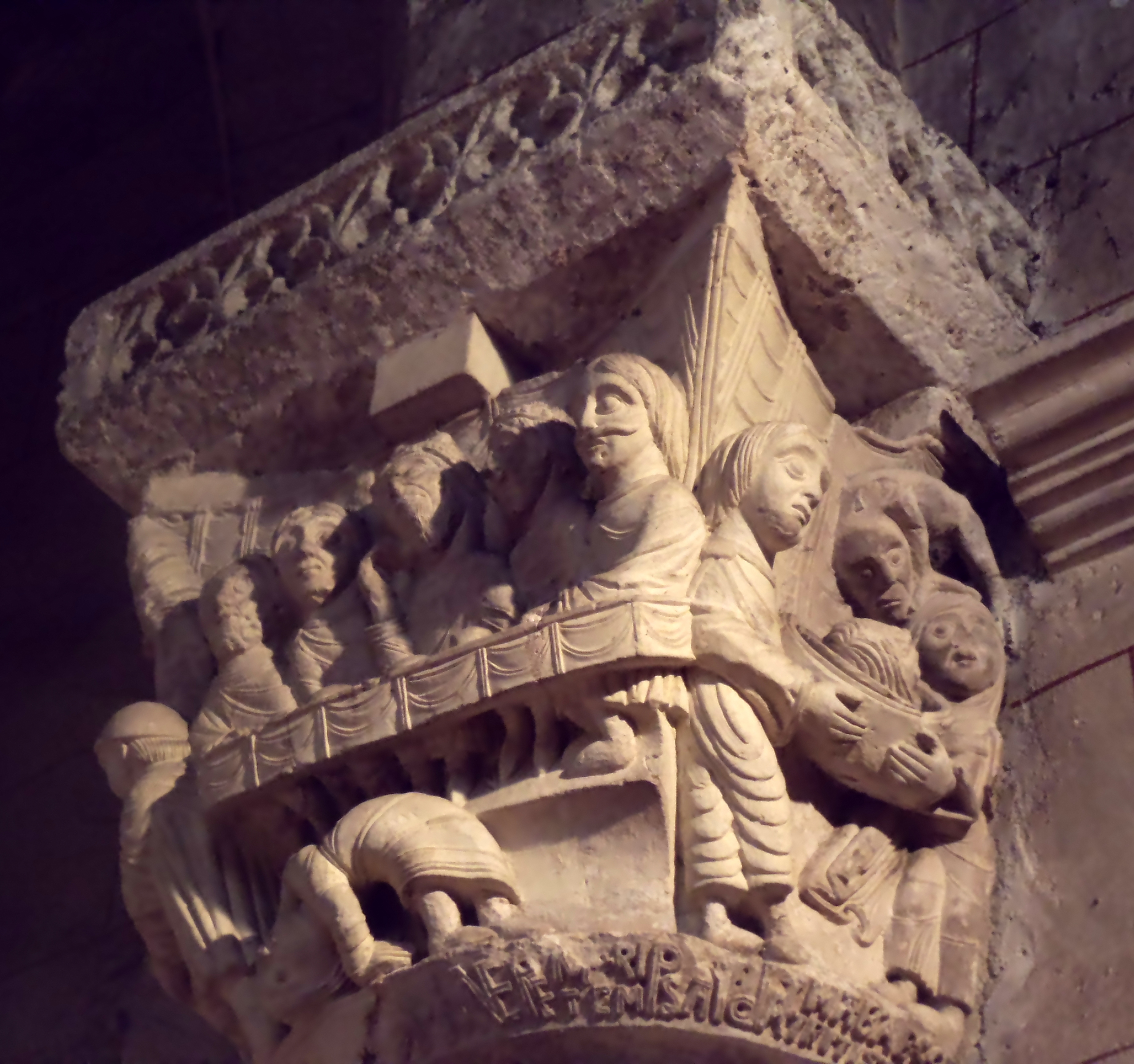 Le banquet d'Hérode, chapiteau de l'abbaye de Saint-Sever (Landes, France)